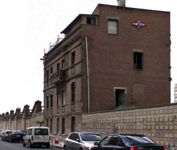 Cocheras del Metro de Madrid, en la calle de Esquilache, junto a la glorieta de Cuatro Caminos.